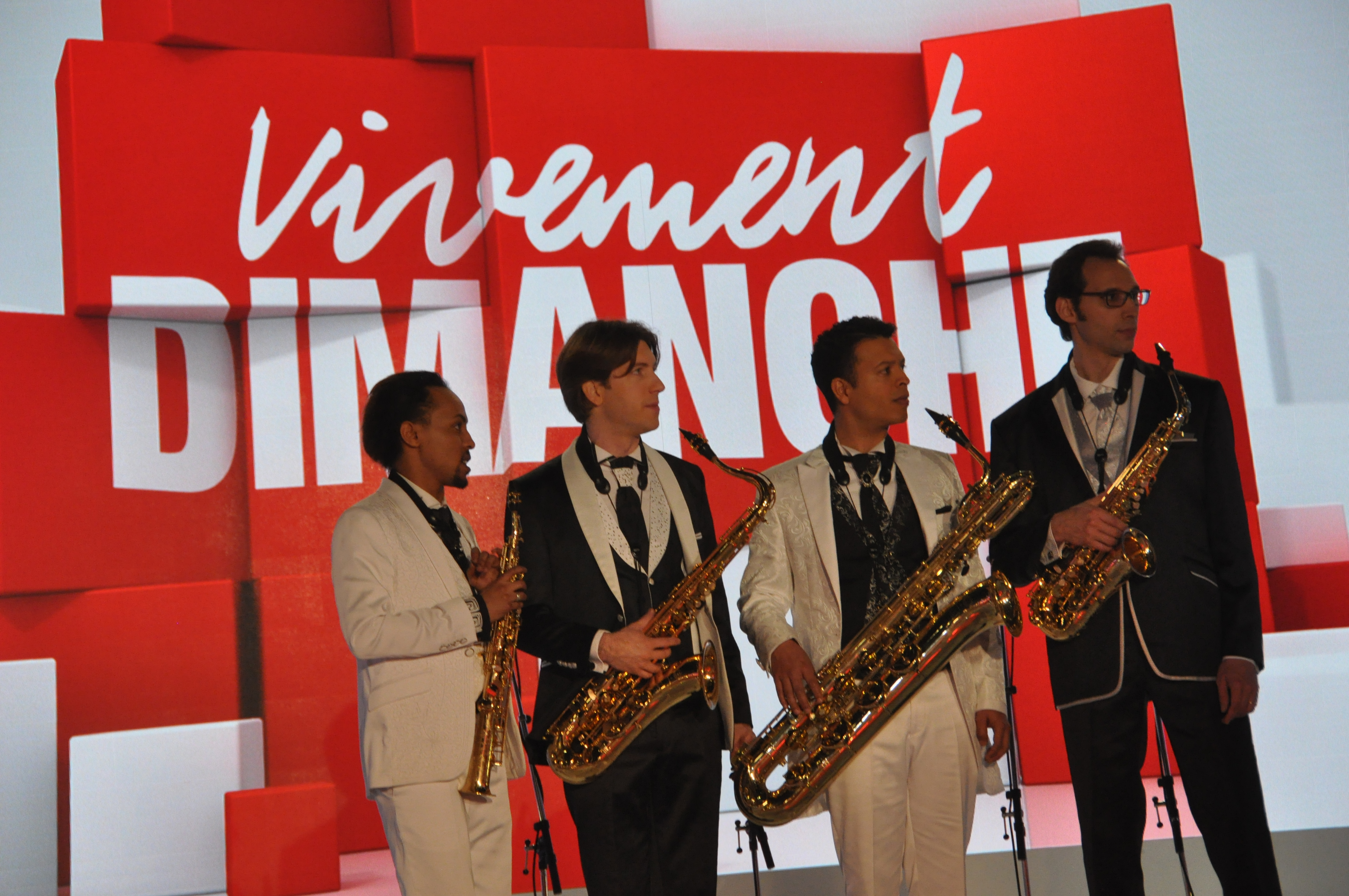 Quatuor Ellipsos invité de "Vivement Dimanche" (France 2, mai 2015), par les comédiens Chevallier et Laspalès.